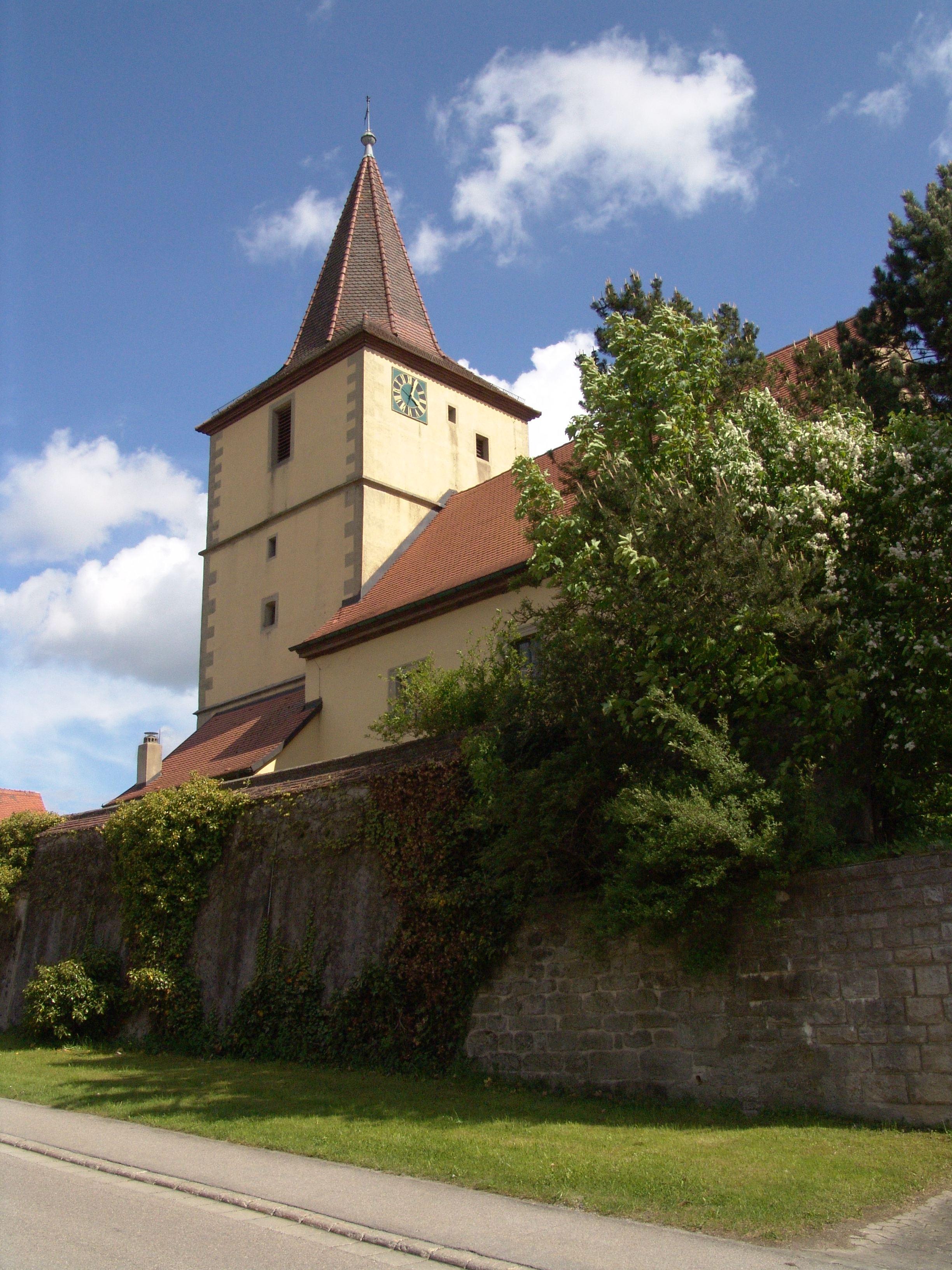 evang.-luth Kirche St. Gallus in Erzberg